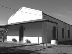 Edificio del Museo de la migración Valdense a Uruguay y Argentina, loxalizado en Colonia Valdense, Departamento de Colonia Uruguay.